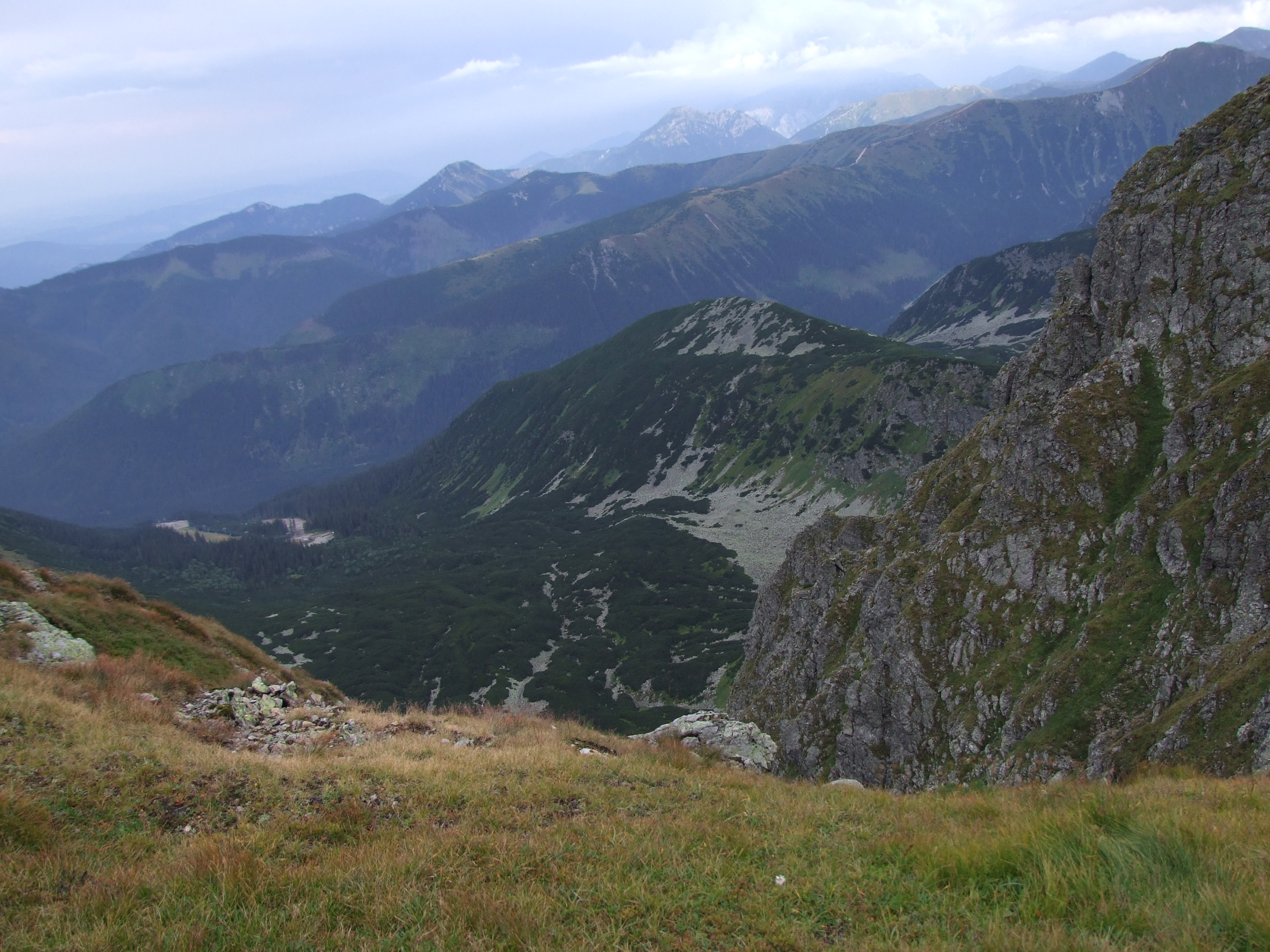 Skrajna Salatyńska Dolina (West Tatra Mountains)